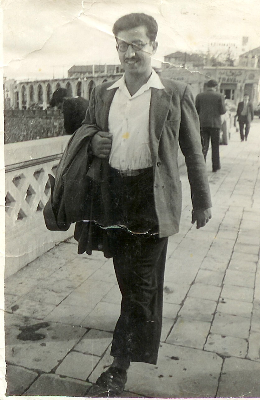 אבו סחיק על הטיילת בביירות